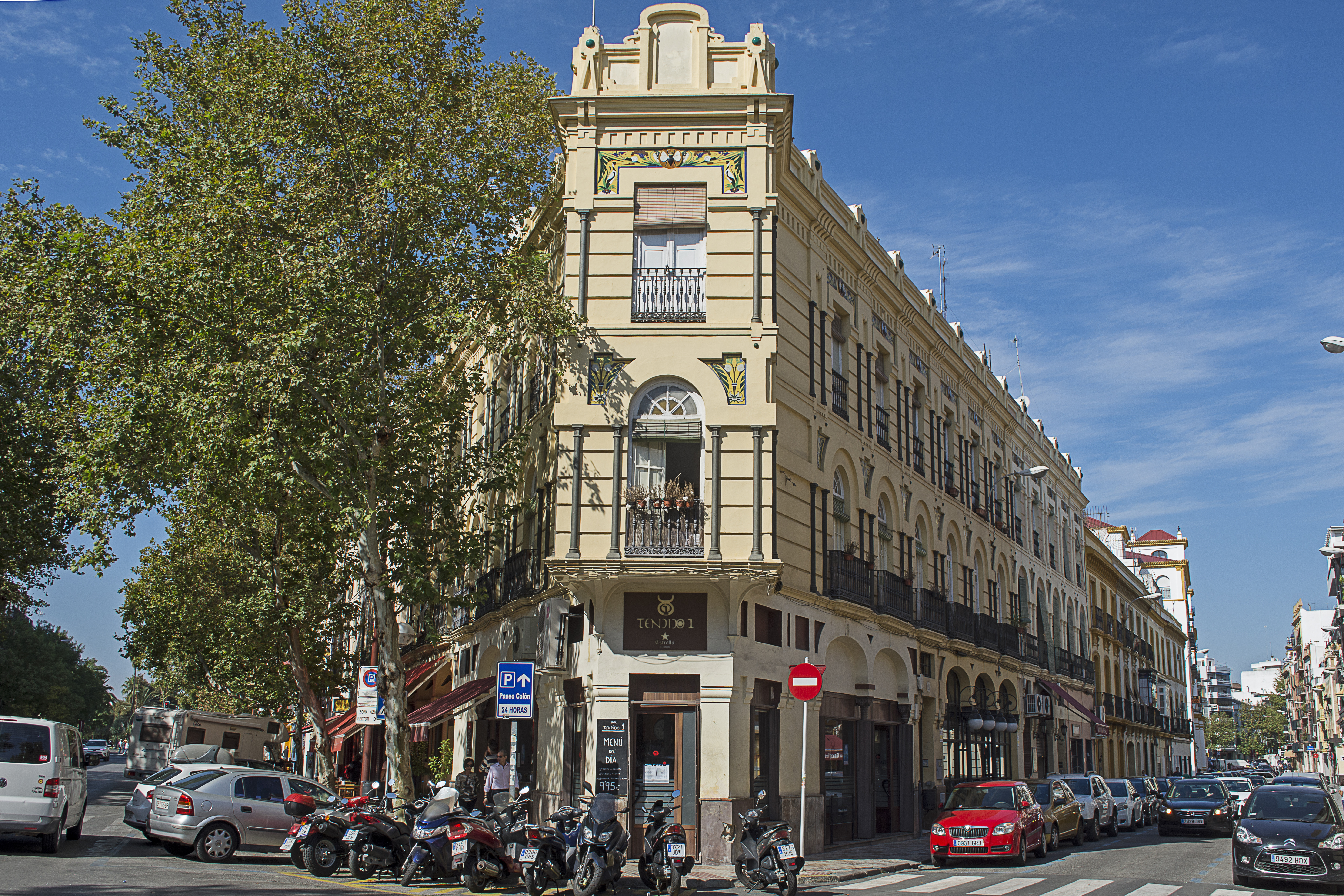 Casa de la moscas en la esquina de la calle Adriano con Pastor y Landero de Sevilla (1912). Arquitecto Aurelio Gómez Millán.